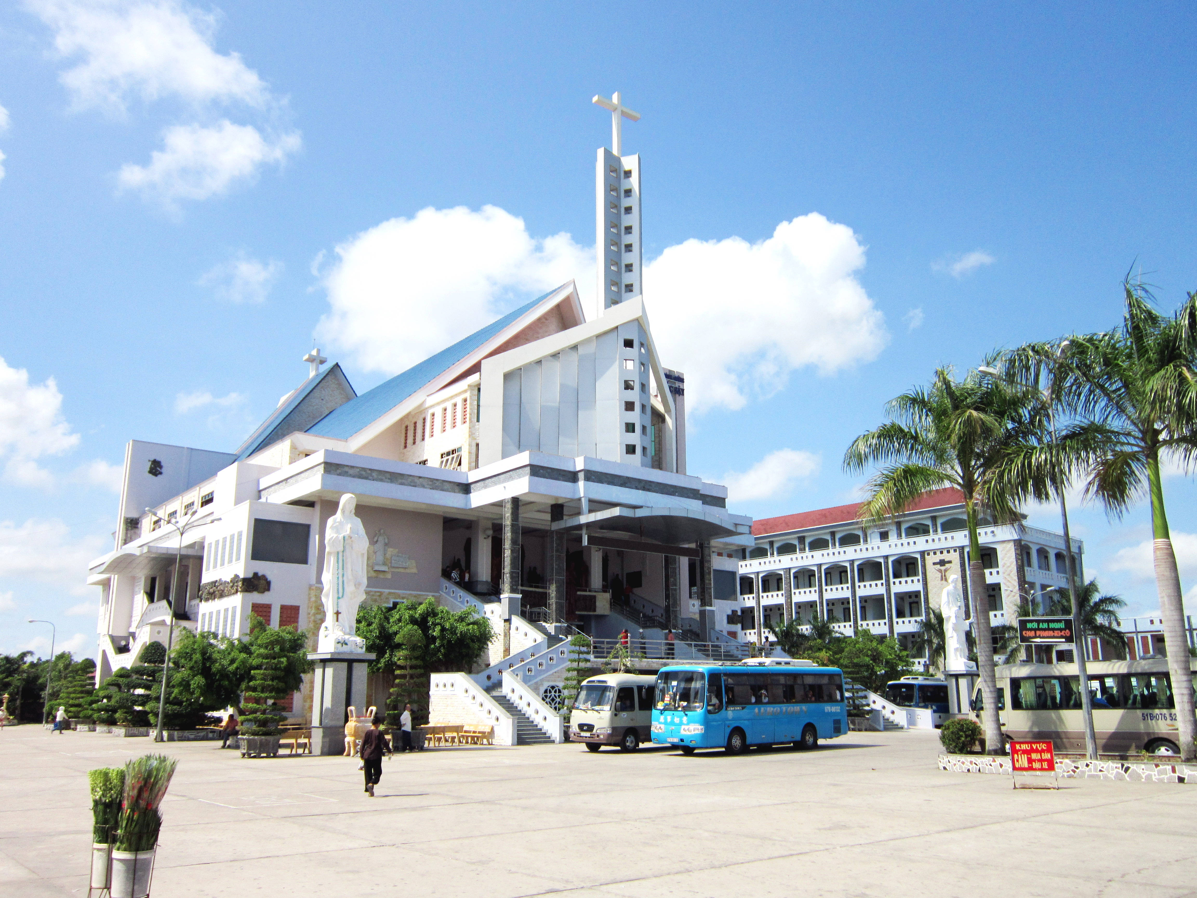 Nhà thờ Tắc Sậy ở xã Tân Phong, huyện Giá Rai, tỉnh Bạc Liêu, Việt Nam.